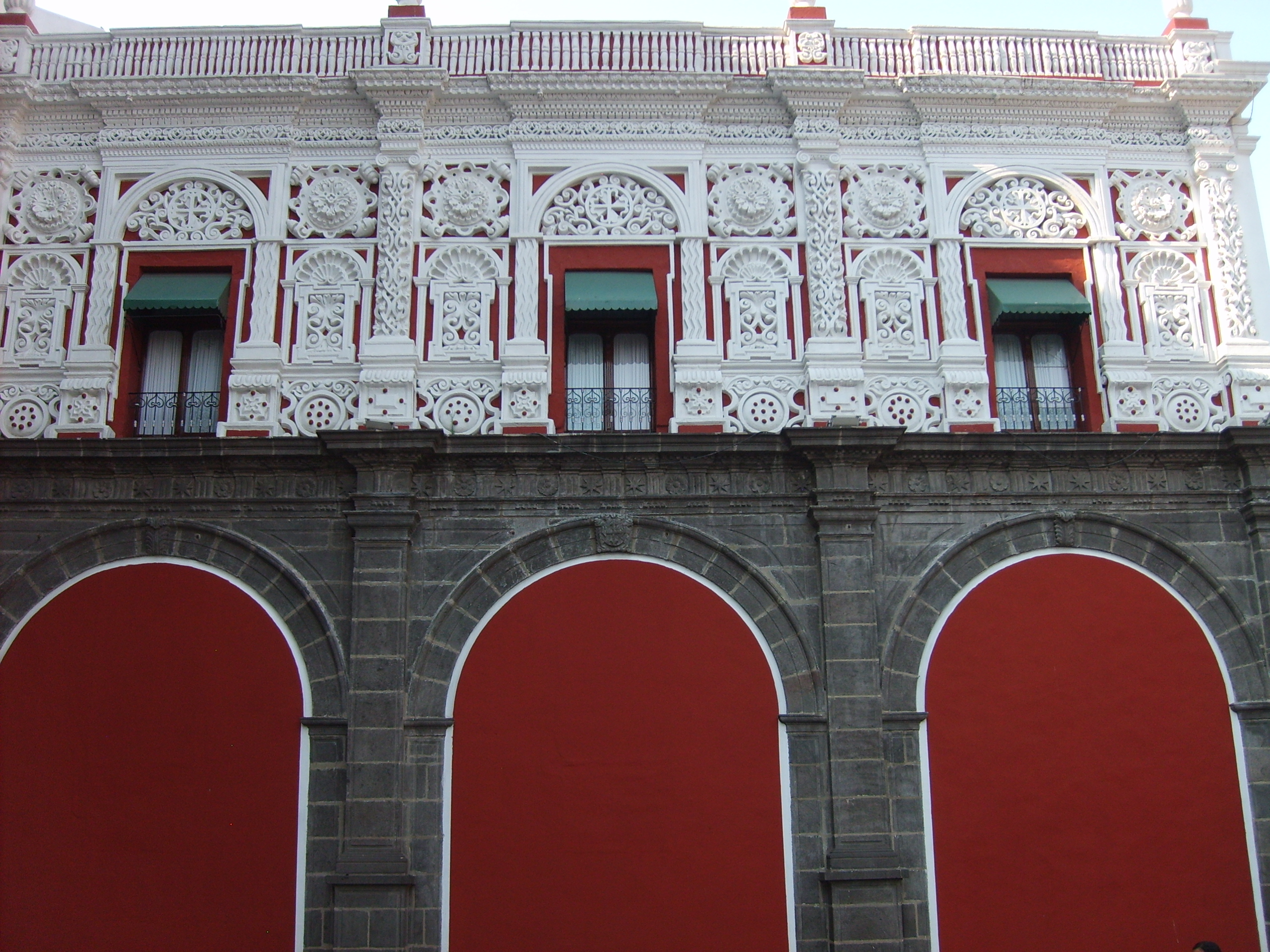 Antigua Portería del convento de Santo Domingo en Puebla, México